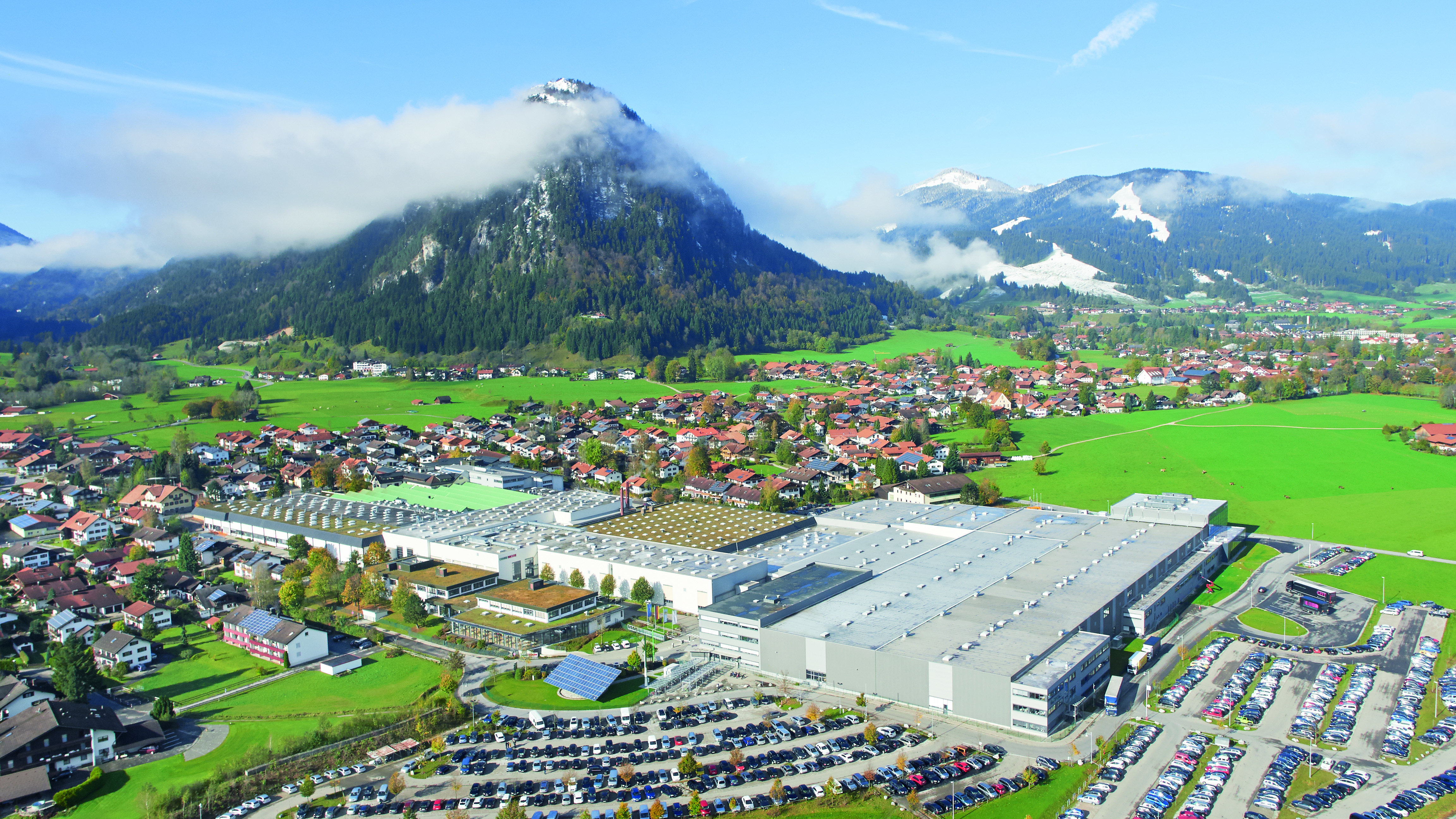 Standort Pfronten